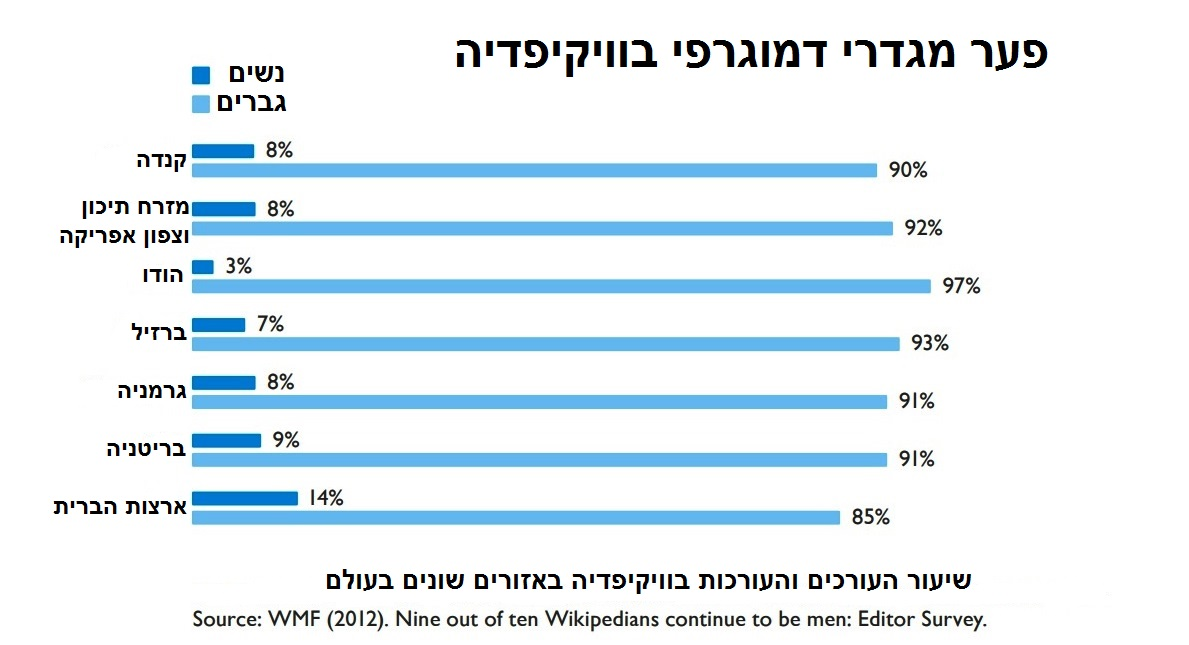 הפער המגדרי הדמוגרפי בוויקיפדיה - לפי אזורים